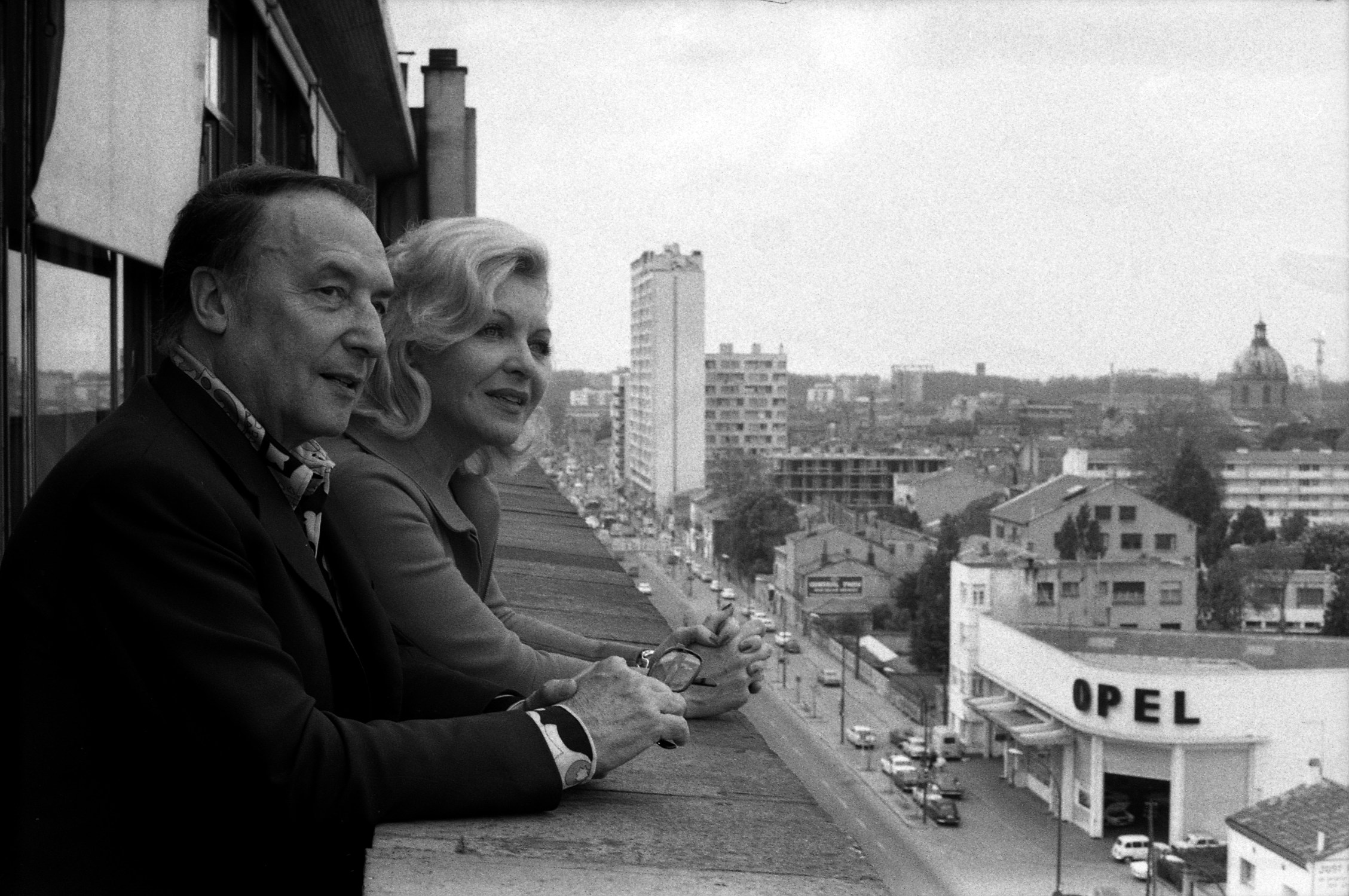 Extèrieur avec vue sur les toits de Toulouse. Le 5 mai 1972. Plan rapproché de Loulou Gasté (compositeur de chansons) en premier plan et de sa femme, Line Renaud accoudée au balcon extèrieur d'un immeuble.